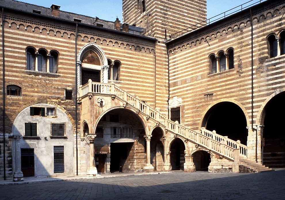 Verona, "Mercato Vecchio"